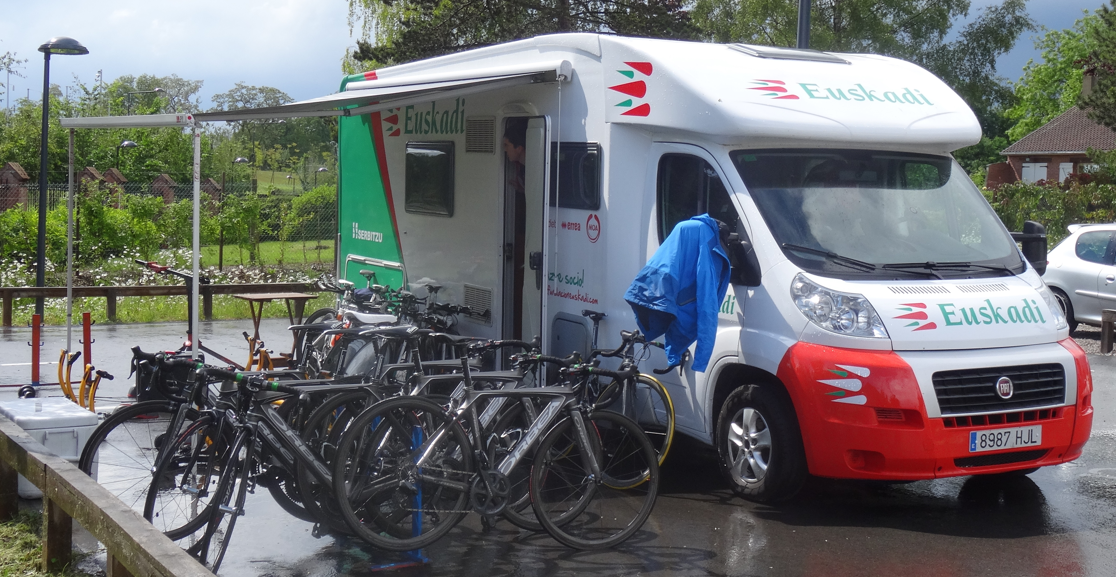 Reportage photographique réalisé le vendredi 23 mai 2014 à l'occasion du départ de la première étape du Paris-Arras Tour 2014 à Lens, Pas-de-Calais, Nord-Pas-de-Calais, France.